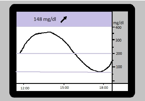 typisches Display eines kontinuierlichen Gewebszuckermessgeräts (CGM)